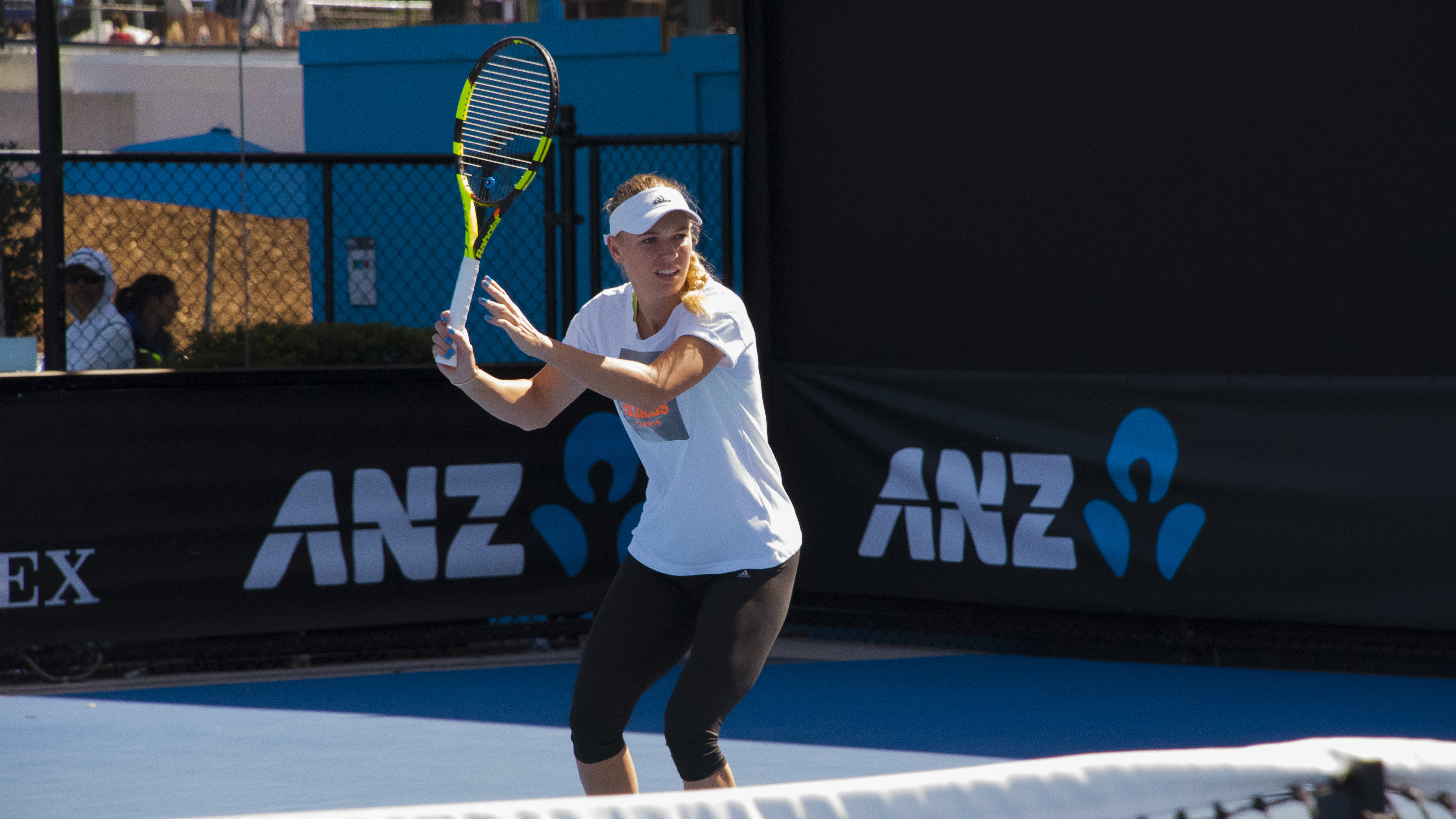 Caroline Wozniacki (Den)